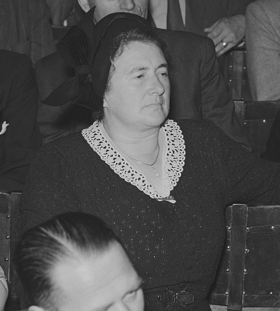 Collectie / Archief : Fotocollectie Anefo Reportage / Serie : [ onbekend ] Beschrijving : herdenking 100 jaar gemeentewet Vereniging van Nederlandse Gemeenten mevrouw Smulders Burgemeester van Middelbeen Datum : 7 juni 1951 Locatie : Utrecht Trefwoorden : burgemeesters, herdenkingen Instellingsnaam : Tivoli Fotograaf : Bilsen, Joop van / Anefo Auteursrechthebbende : Nationaal Archief Materiaalsoort : Glasnegatief Nummer archiefinventaris : bekijk toegang 2.24.01.09 Bestanddeelnummer : 904-6063